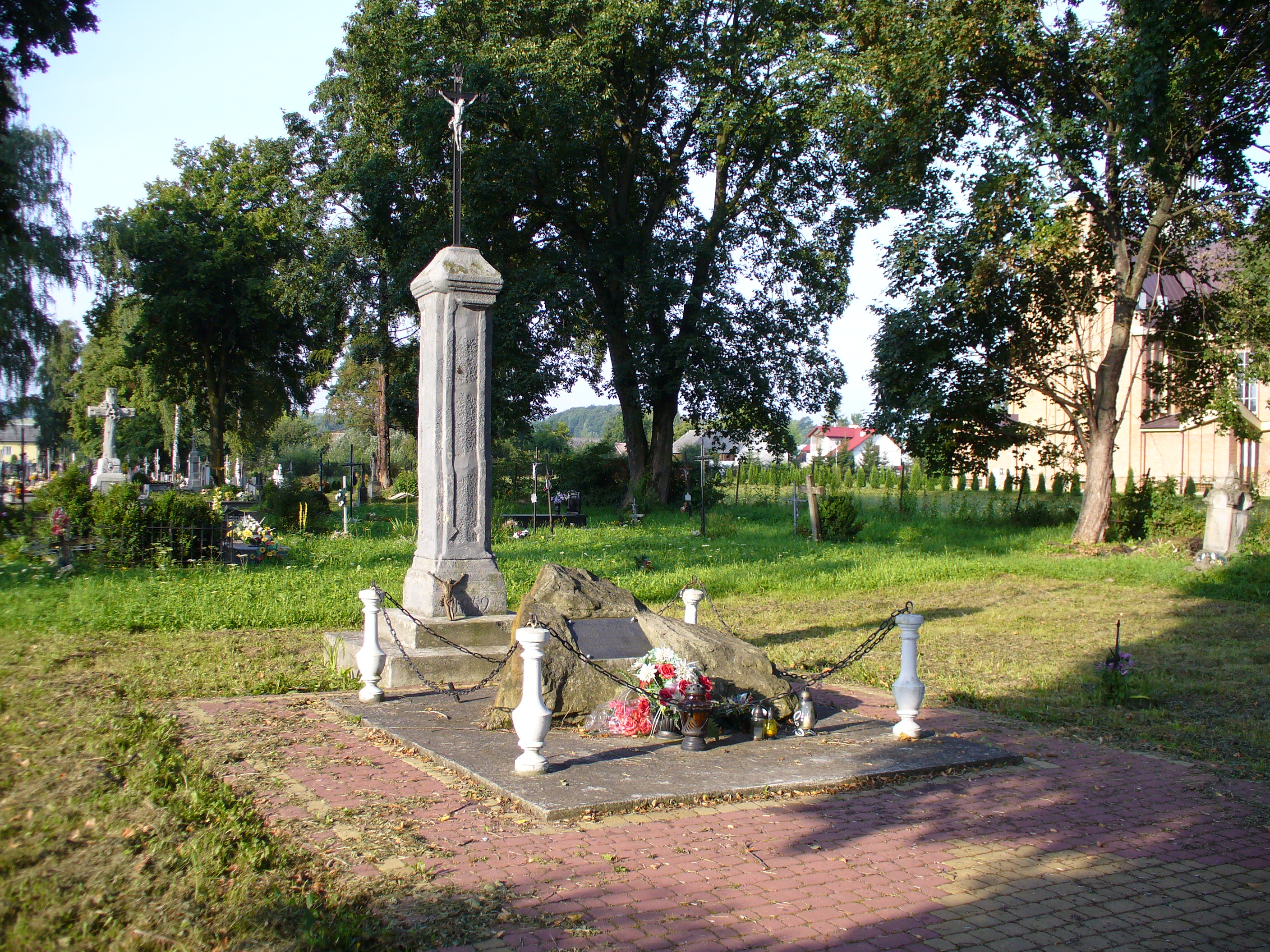 Besko